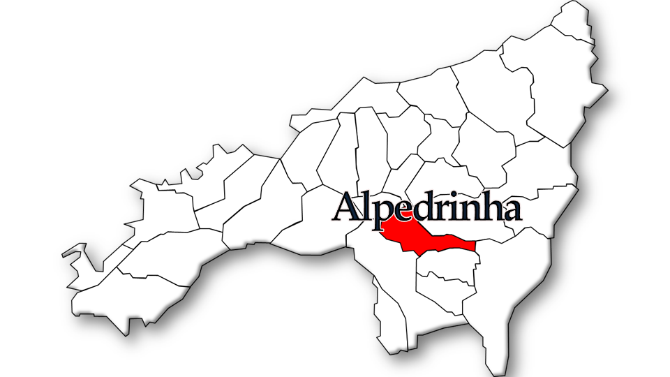 População